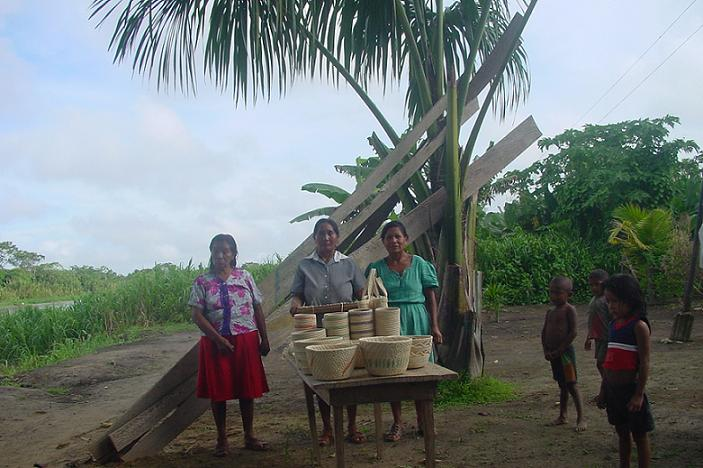 Mujeres warao con cestería. Contribución de Marie-Claude Matteu Müller.